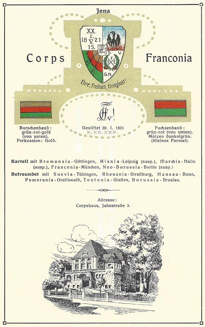 Wappen, Farben, Verhältniscorps und Corpshaus der Franconia Jena